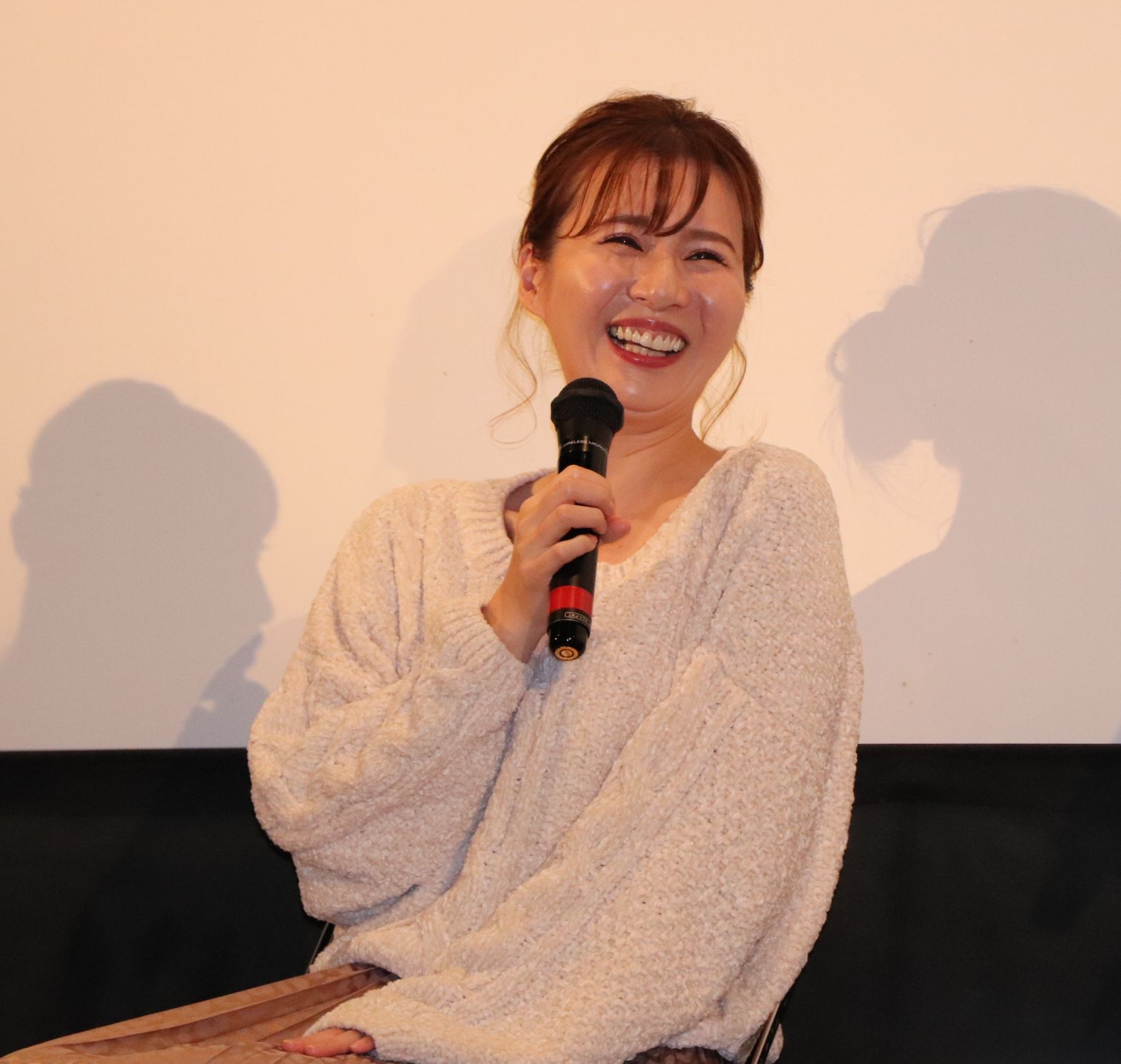 上野オークラ劇場・舞台挨拶